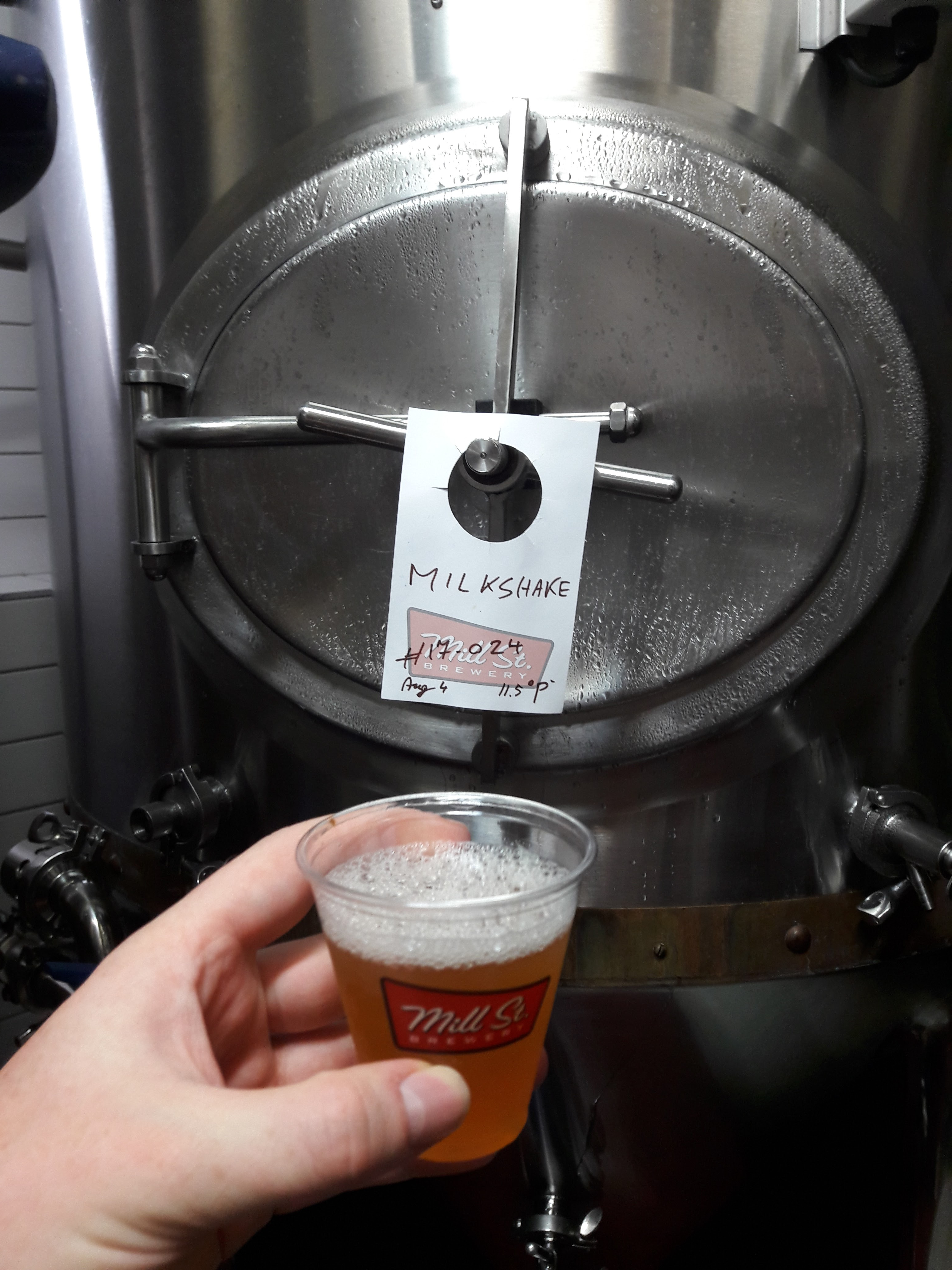 Gärtank im Mill Street Brew Pub, Ottawa